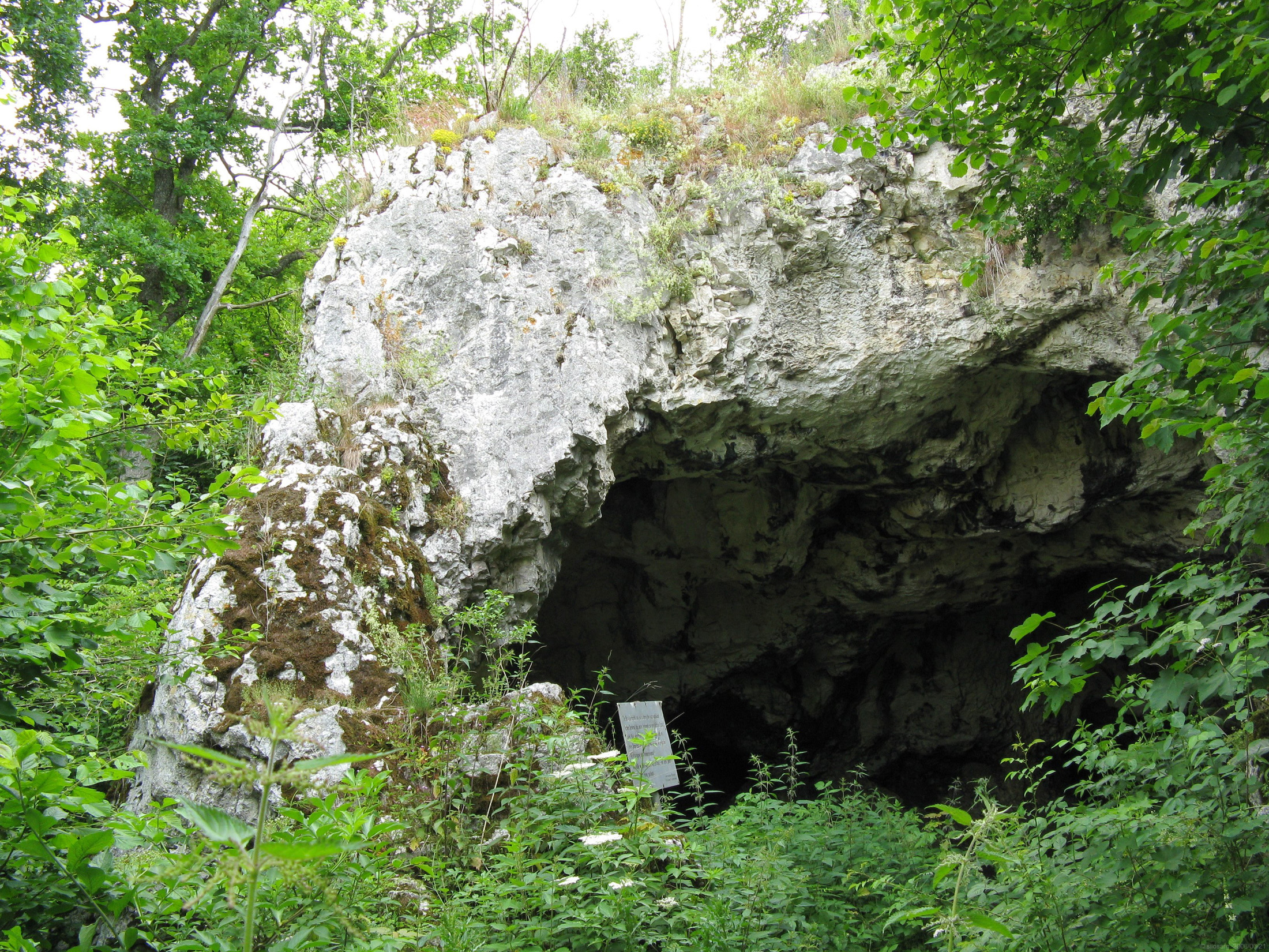 Die Bocksteinhöhle im Lonetal, Süddeutschland